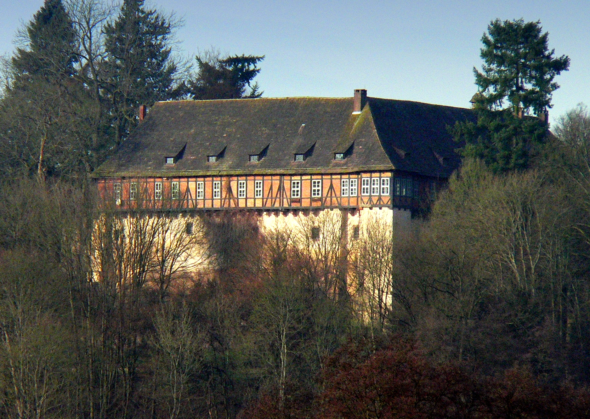 Ehemaliges Jagdschloss in Bodenfelde-Nienover, seit 1949 im Besitz Niedersachsens. Seit 2005 Privatbesitz.